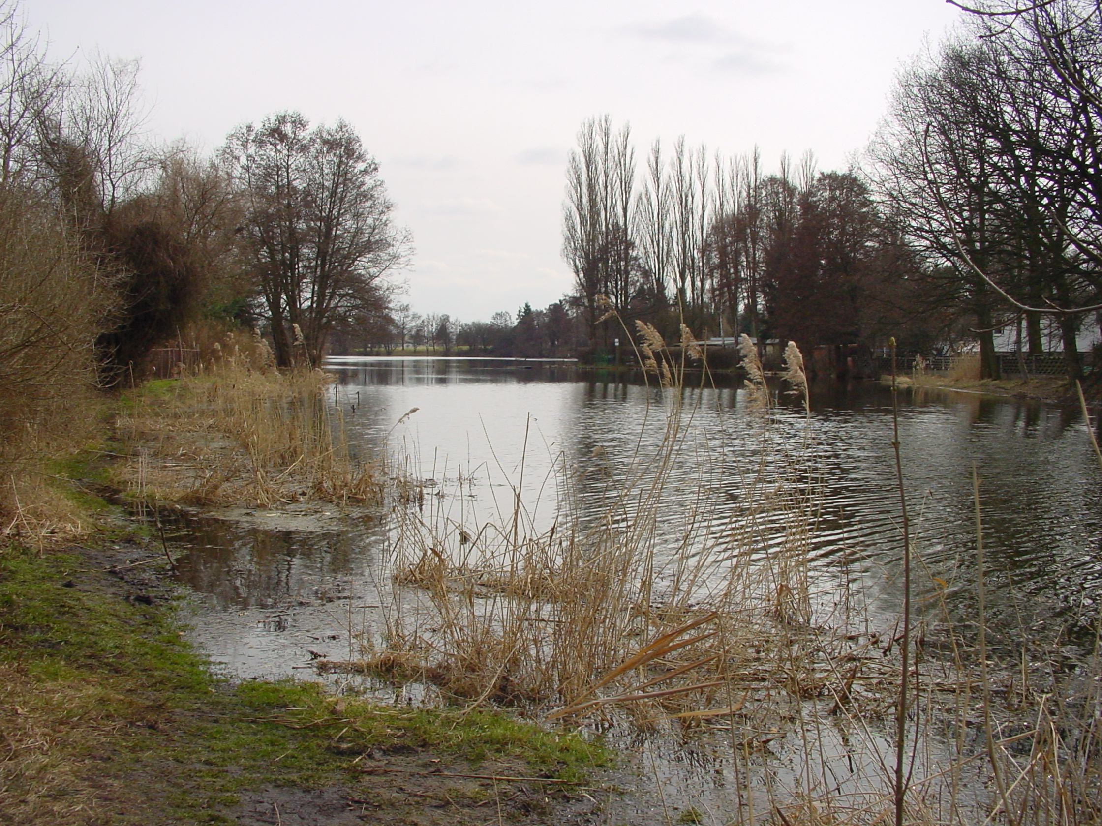 Haussee in Hönow / Weiherkette